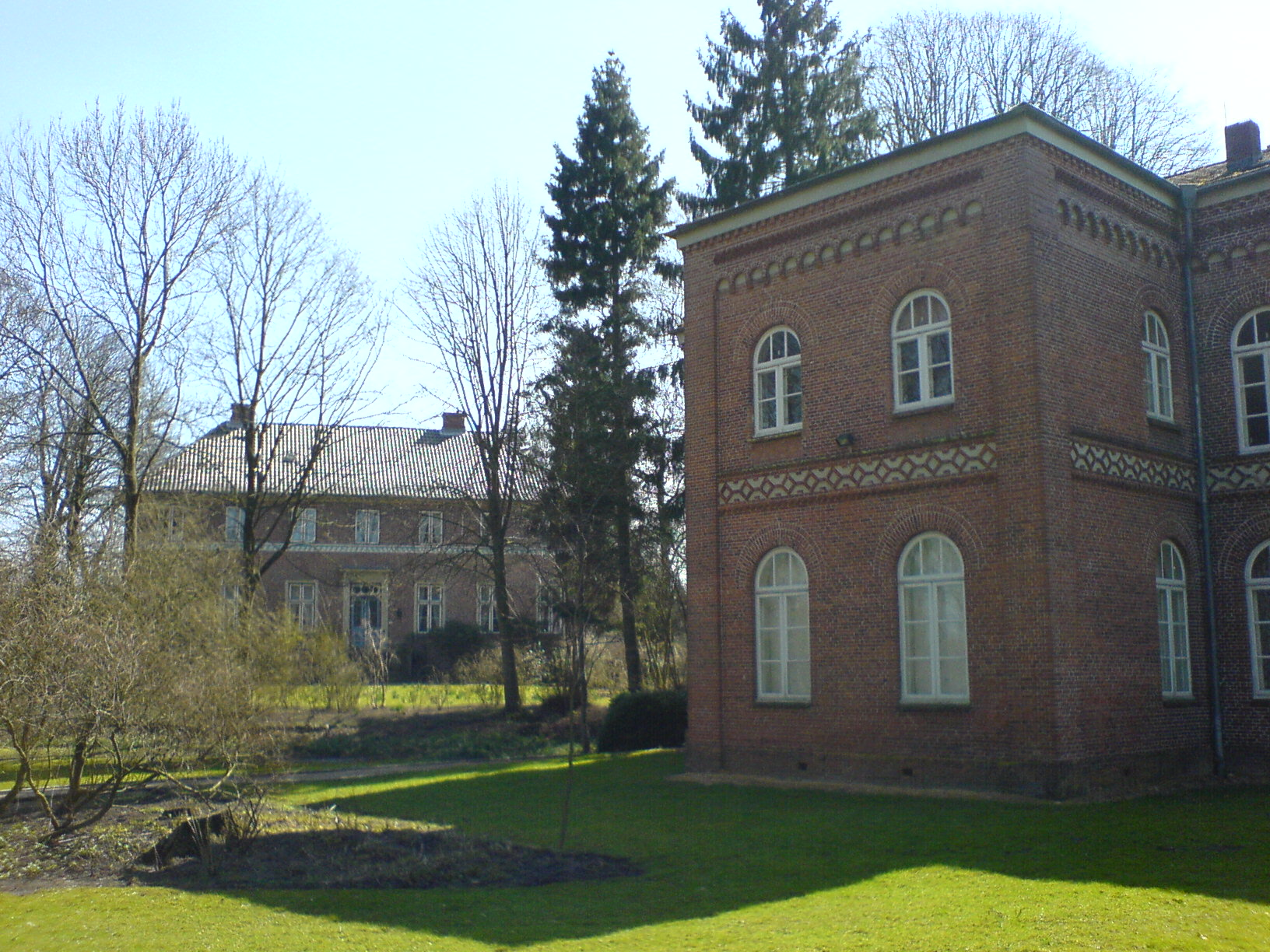 Schloss und Gericht